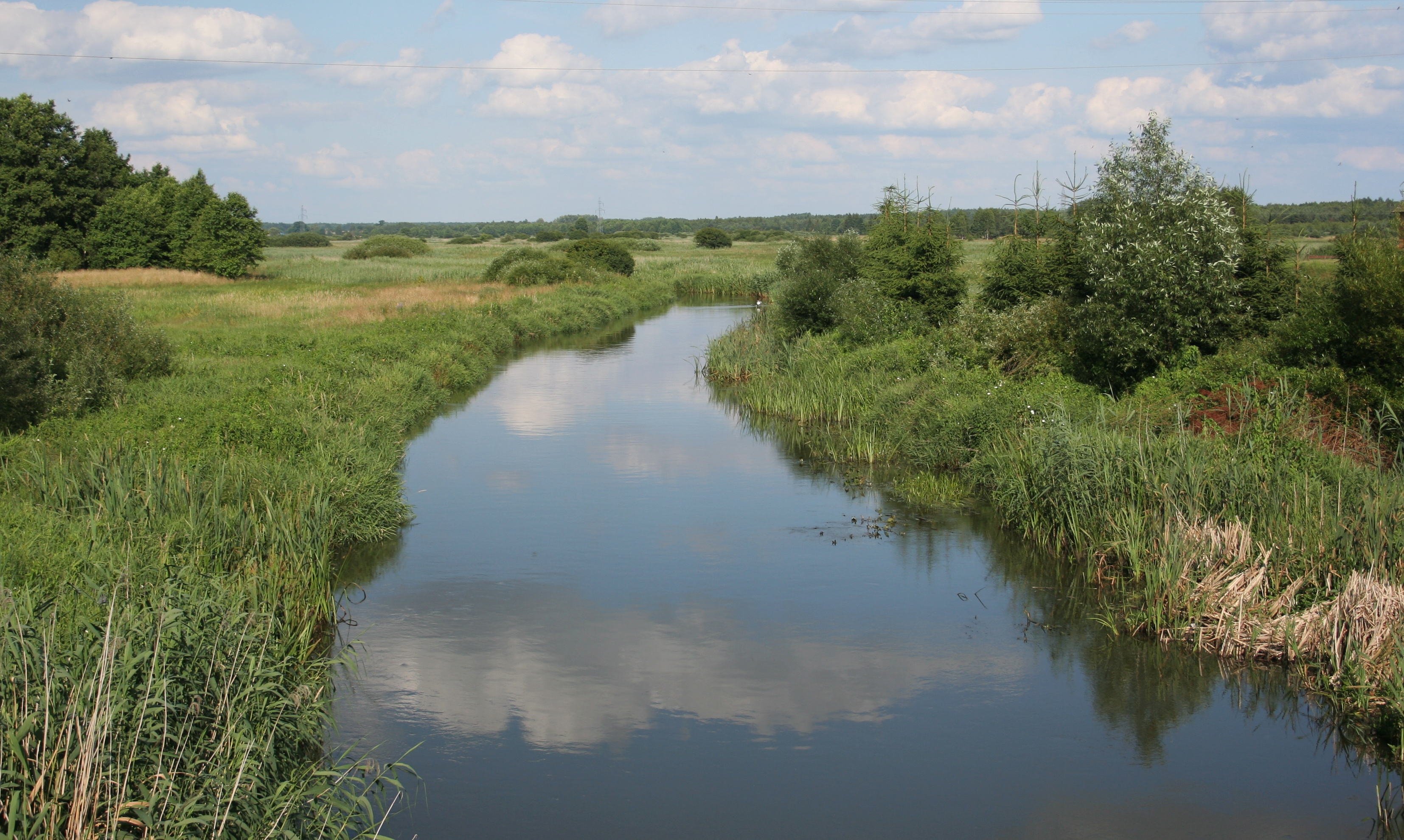 Rzeka Narew w pobliżu miejscowości Suszcza, woj. podlaskie